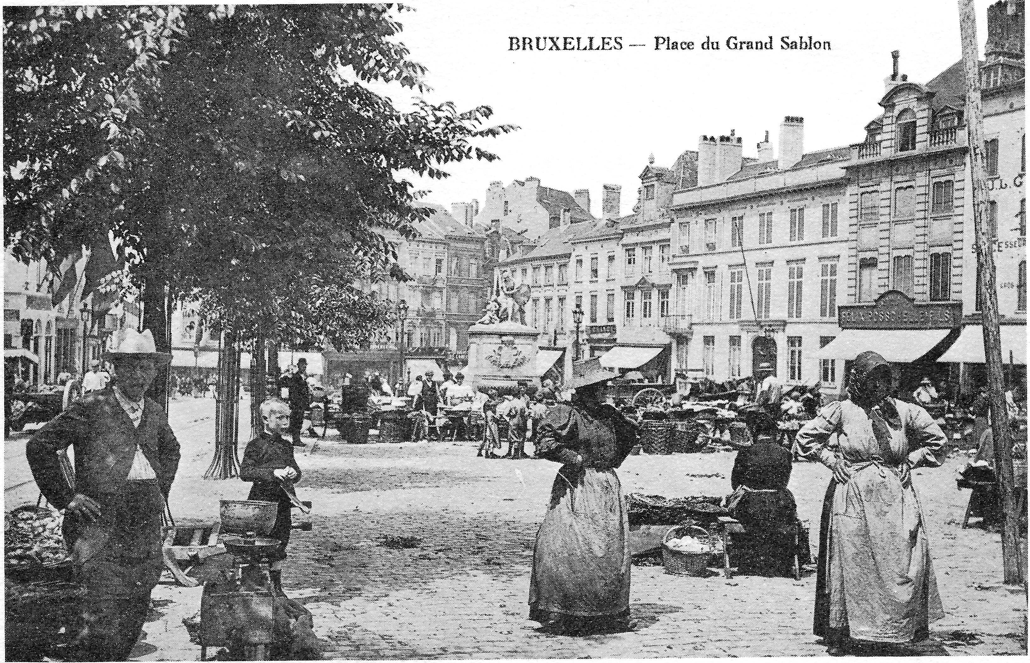 Herdrukte briefkaart van de Groote Zavel in de 1900s